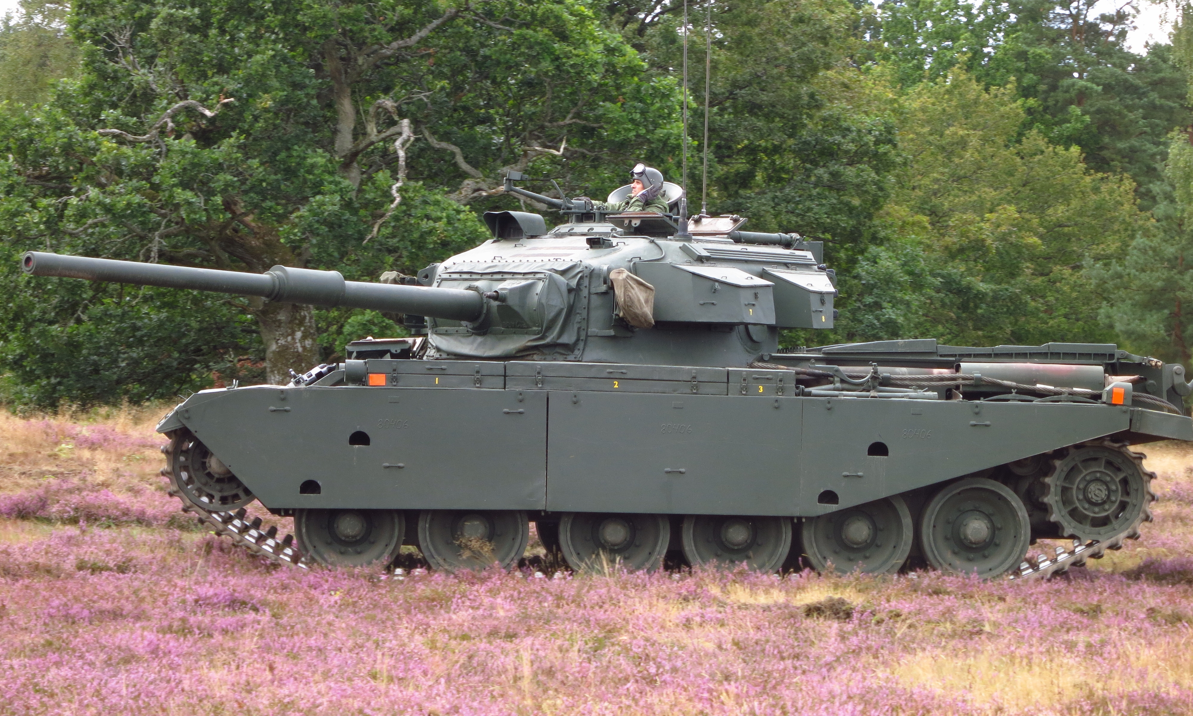 Stridsvagn 102 ( Centurion ) vid Regementets Dag på P7 Revingehed